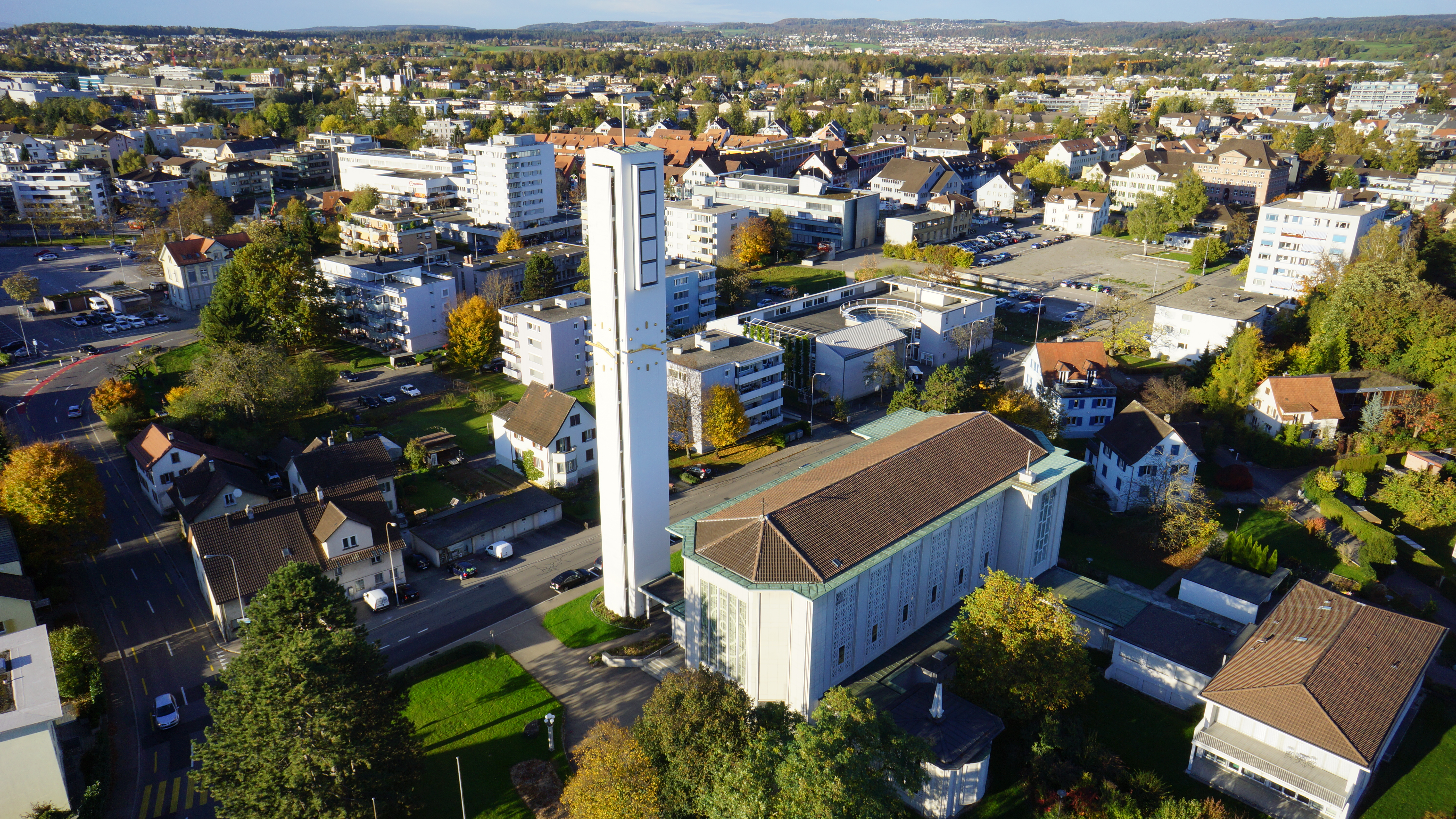 Römisch-katholische Pfarrkirche Maria Frieden Dübendorf, Luftbild von Süden